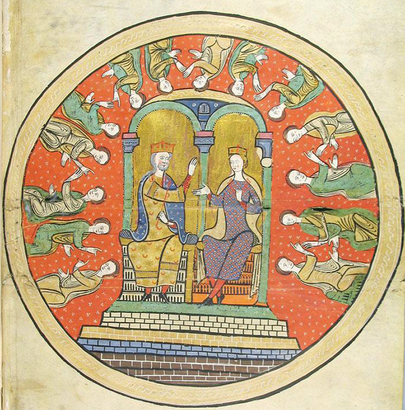 Alfons II. Aragonský a Sancha Kastilská